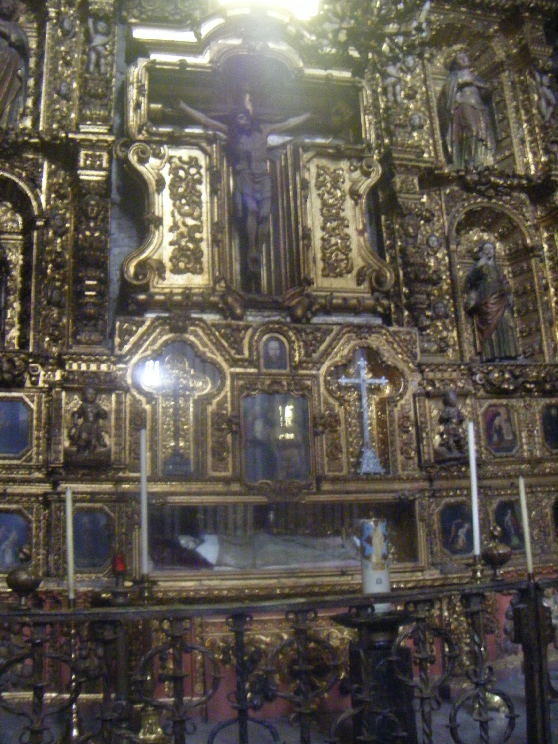 Crucifijo conocido como El Cristo de los Conquistadores, en la capilla del mismo nombre. Catedral Metropolitana de la Ciudad de México.